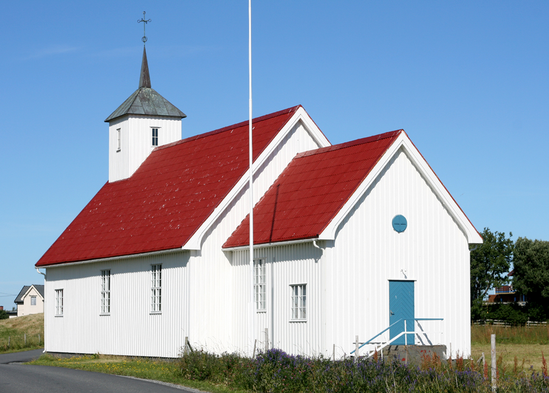 Lovund kapell, Lurøy, Nordland